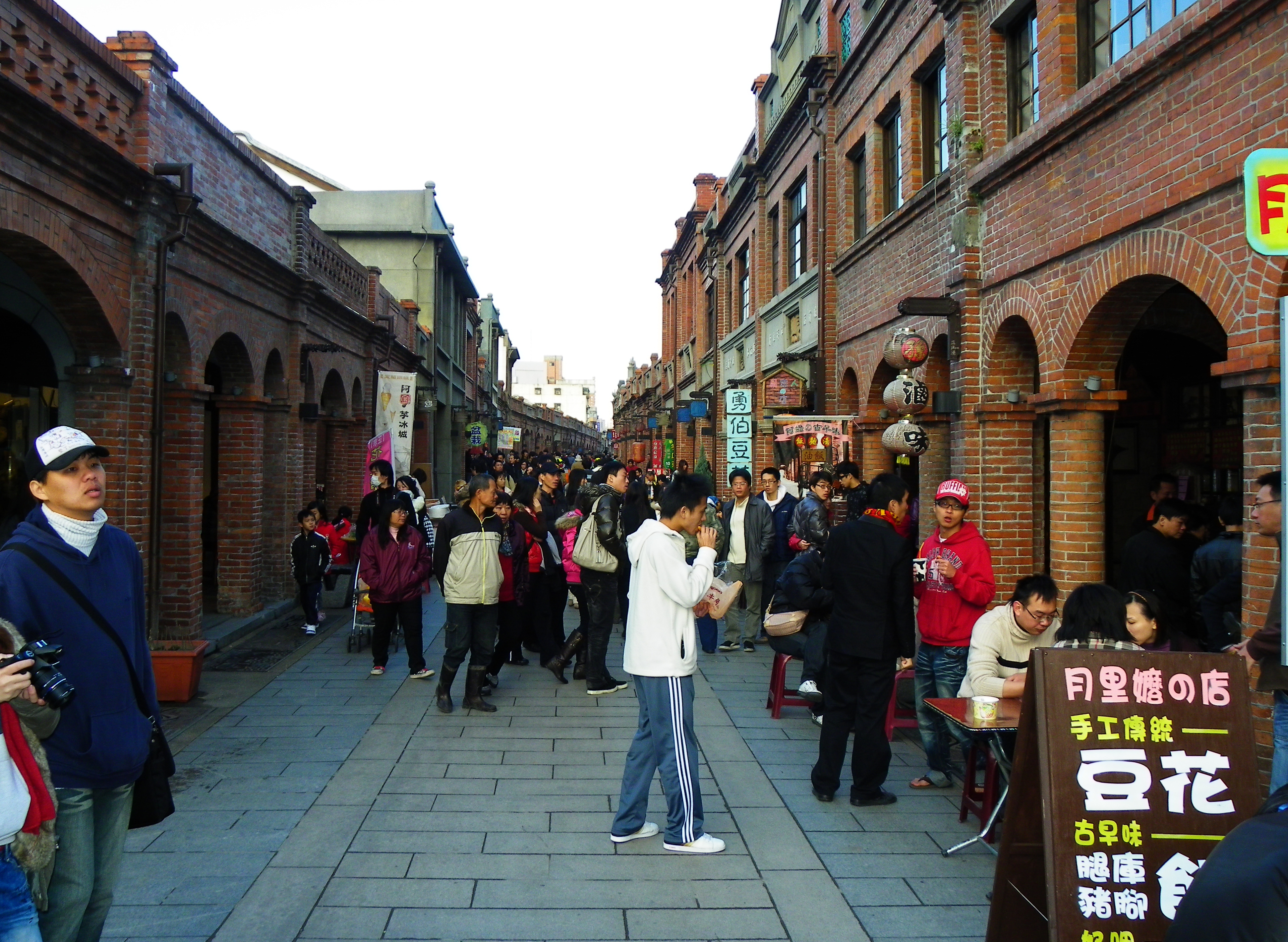 中文（台灣）: 假日的新北市三峽區民權街。